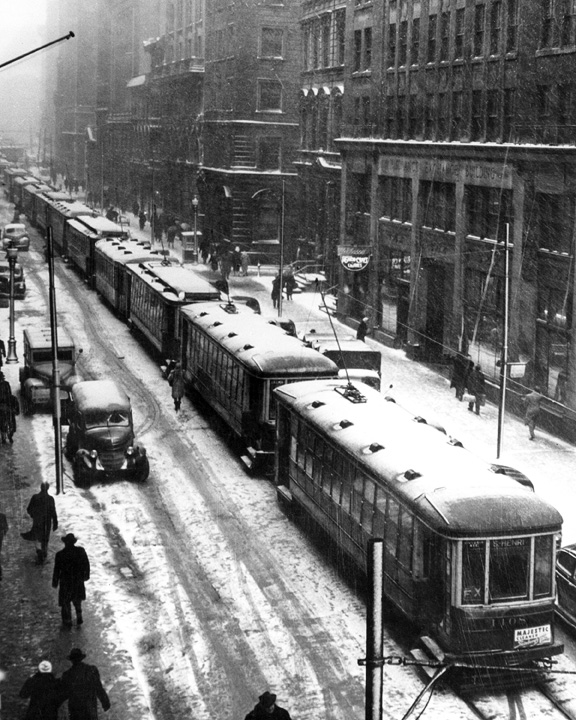 File de tramways sur la rue Saint-antoine.